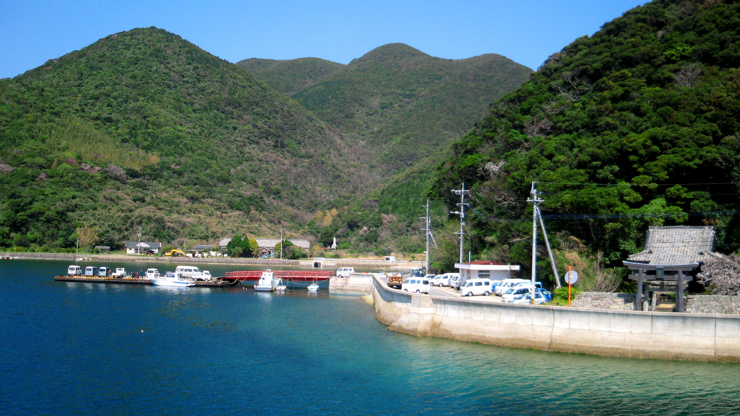 五島市田ノ浦町（久賀島田ノ浦港）